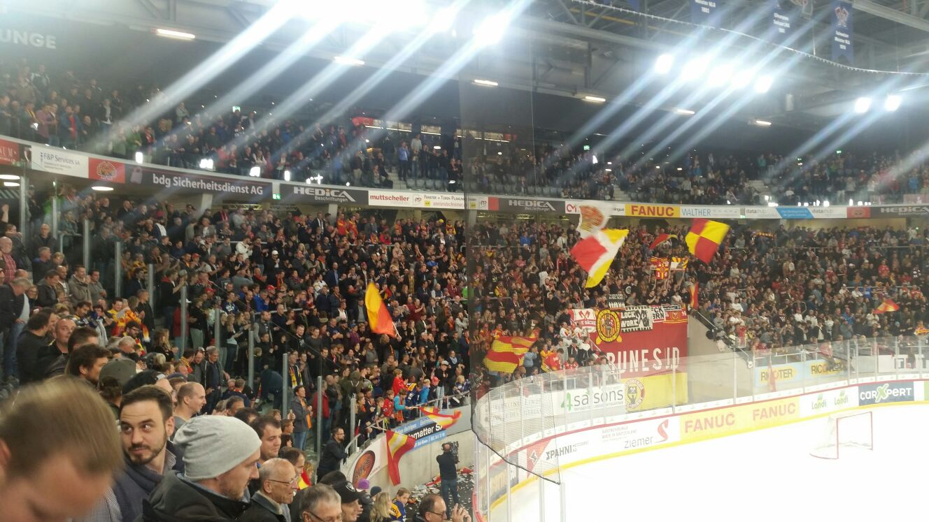 Tribune debout du HC Bienne